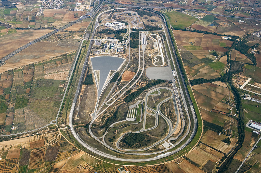 Proving Ground der Applus+ IDIADA